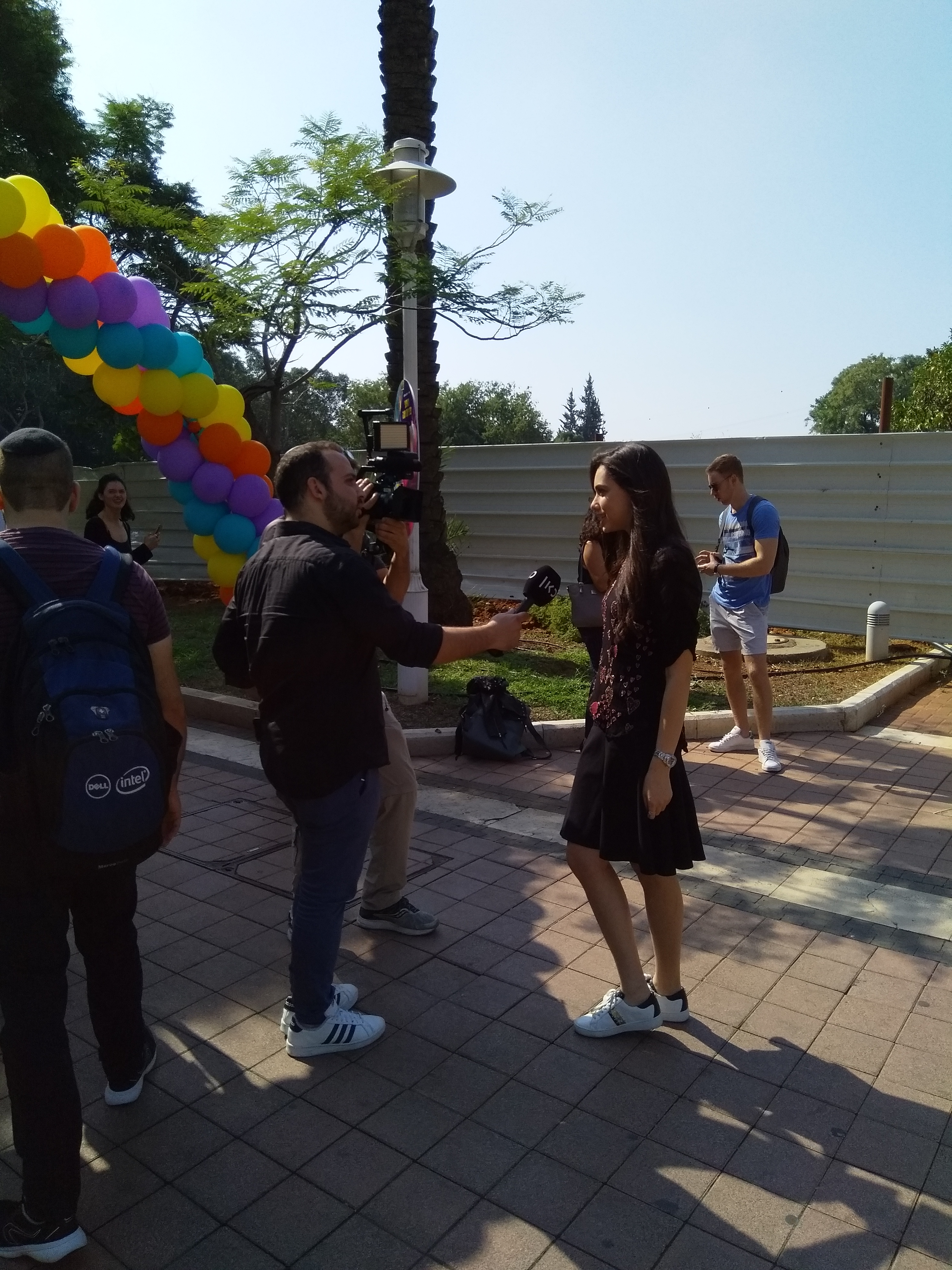 אוריה אלקיים מראיין סטודנטית ביום פתיחת שנה"ל תש"פ באוניברסיטת בר אילן